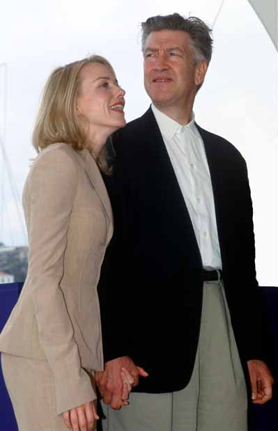 David Lynch con Naomi Watts Watts, Naomi and Lynch, David at Cannes in 2001. My own picture. Created by Rita Molnár 2001.